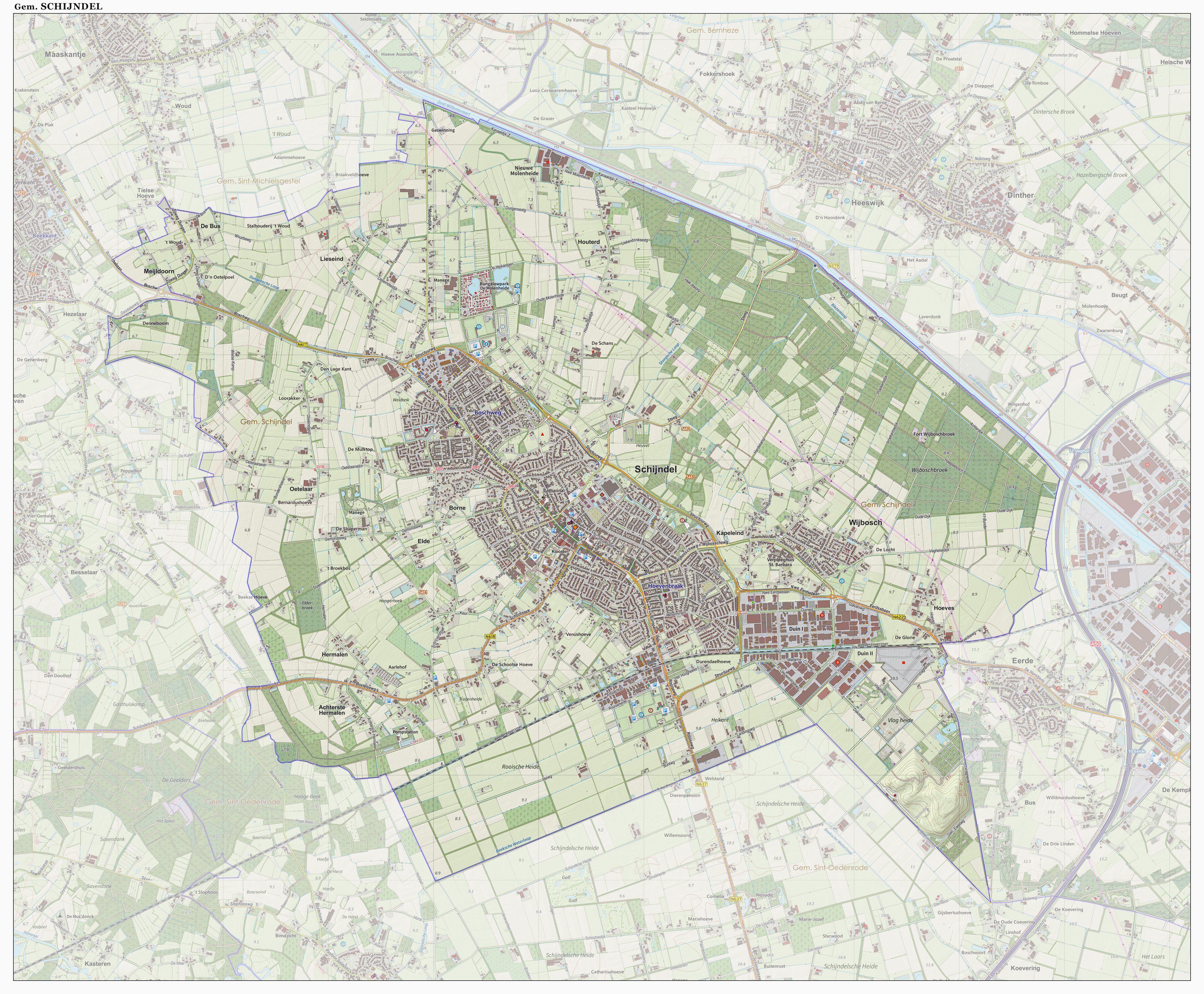 Topografische gemeentekaart. Resolutie: 400 pixels/km. Kaartbeeld samengesteld uit de open geodata van de Top10NL en Top25namen (Kadaster), Creative Commons-BY licentie. Gebouwvlakken uit open geodata BAG extract. Wegen uit de OpenStreetMap, OpenStreetMap community. Reliëfschaduw uit de Actuele Hoogtekaart AHN2. Samenstelling en kleurenschema: Jan-Willem van Aalst, met QGIS. Zie ook de Legenda.